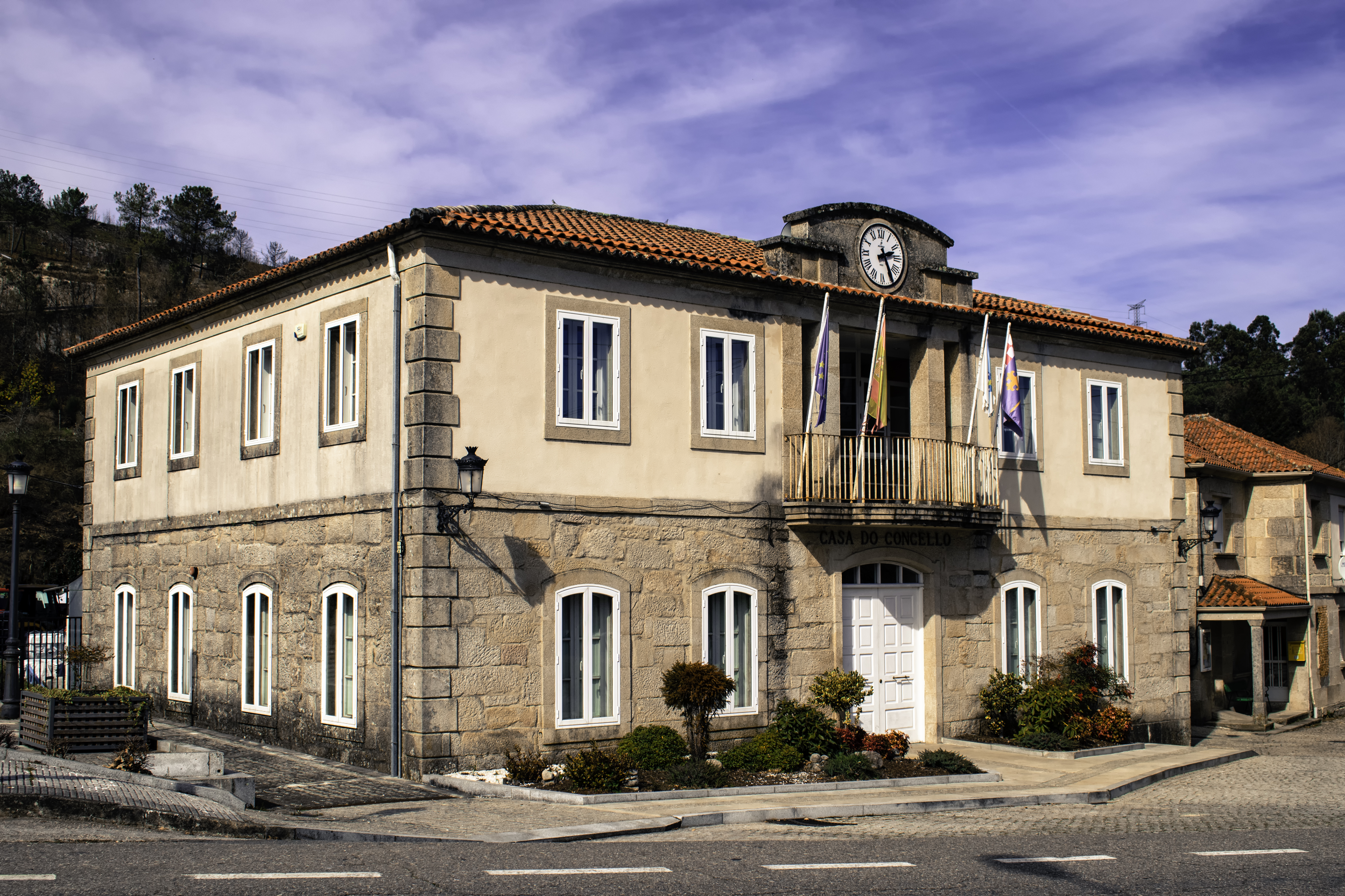 Casa do concello de Melón, Ourense.